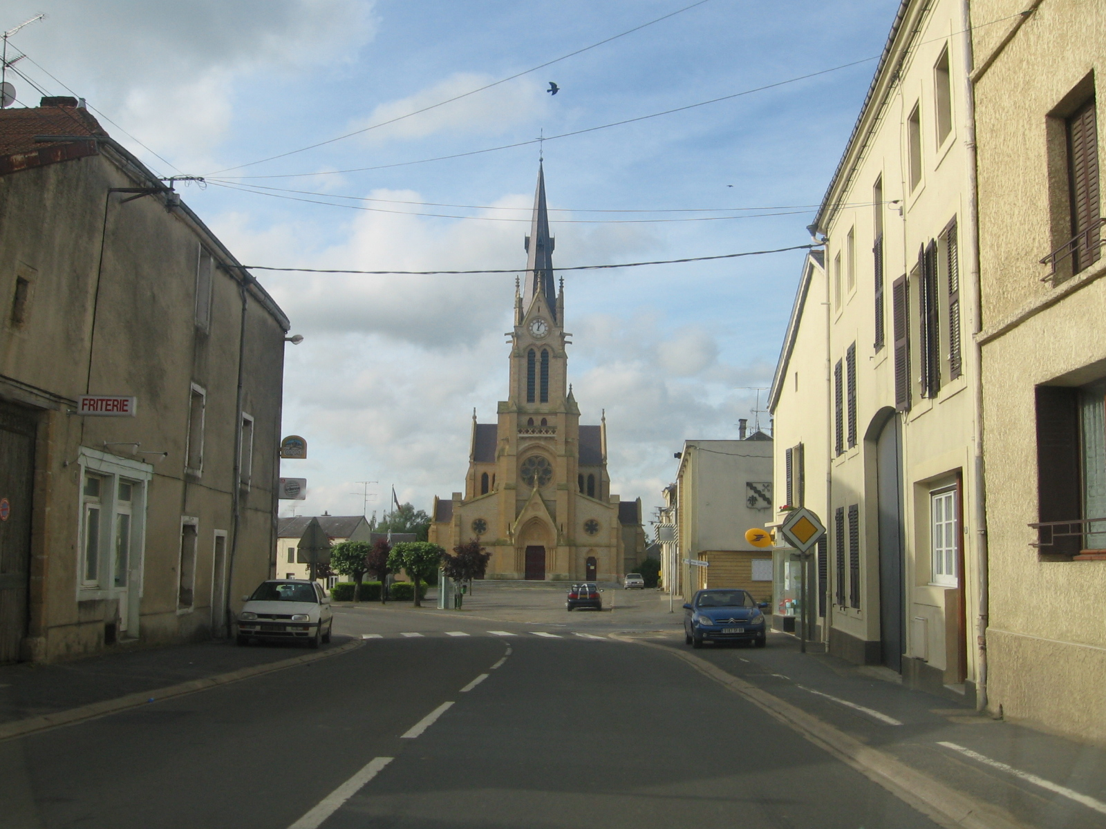 Douzy